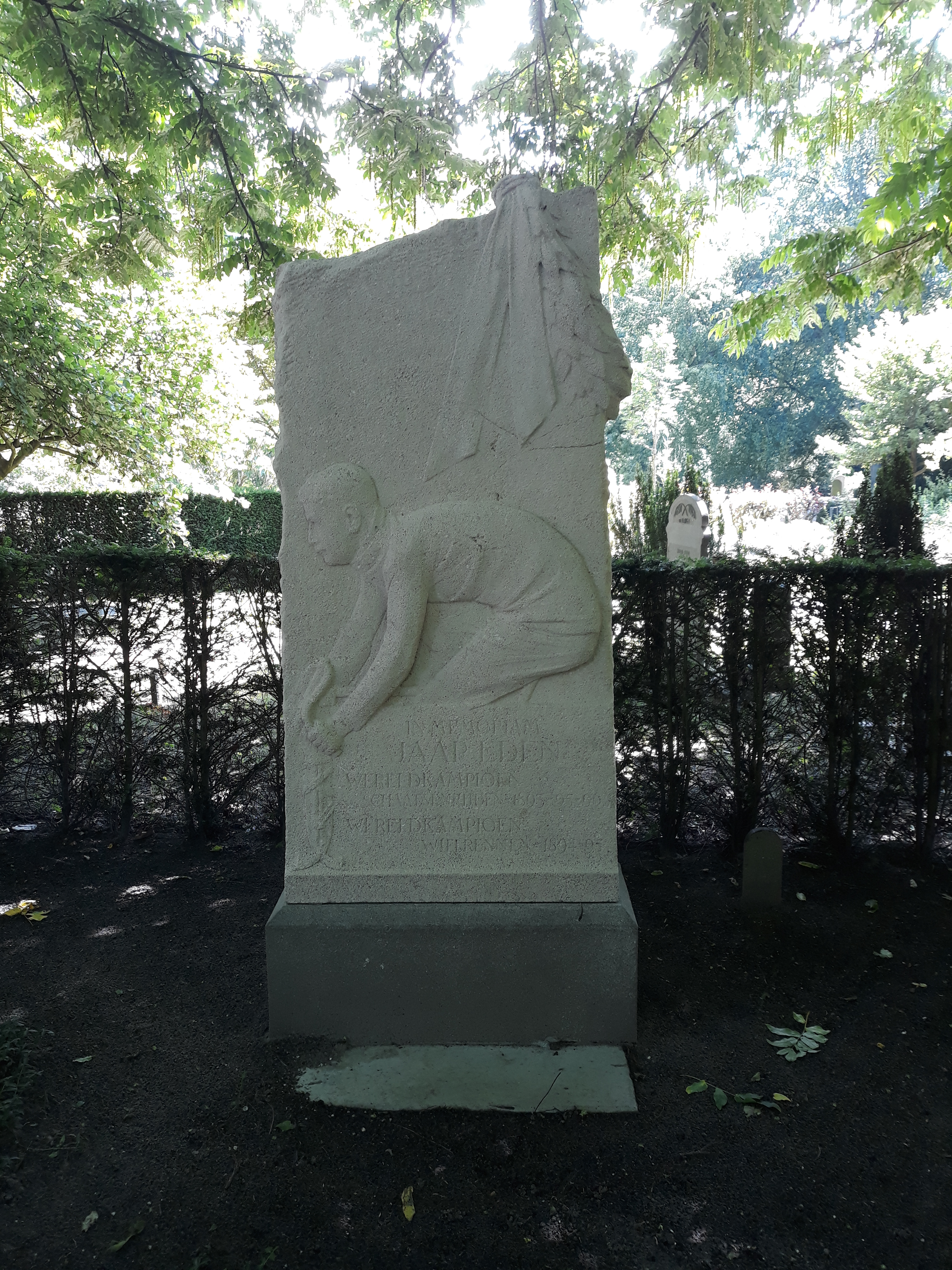 Das Grab des niederländischen Schlittschuhläufers und Radrennfahrers Jaap Eden auf dem Friedhogf Kleverlaan in Haarlem.